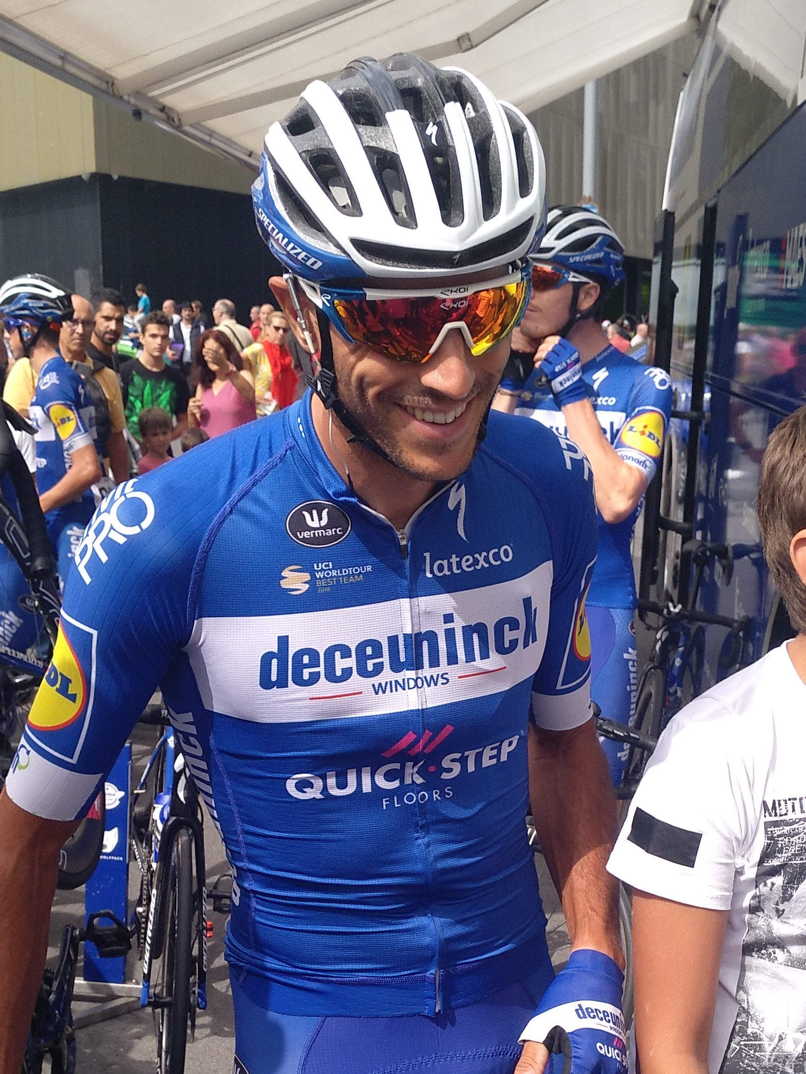 El italiano Eros Capecchi, del equipo Deceuninck-Quick Step, en la salida en Bilbao en la 13ª etapa de la Vuelta a España 2019